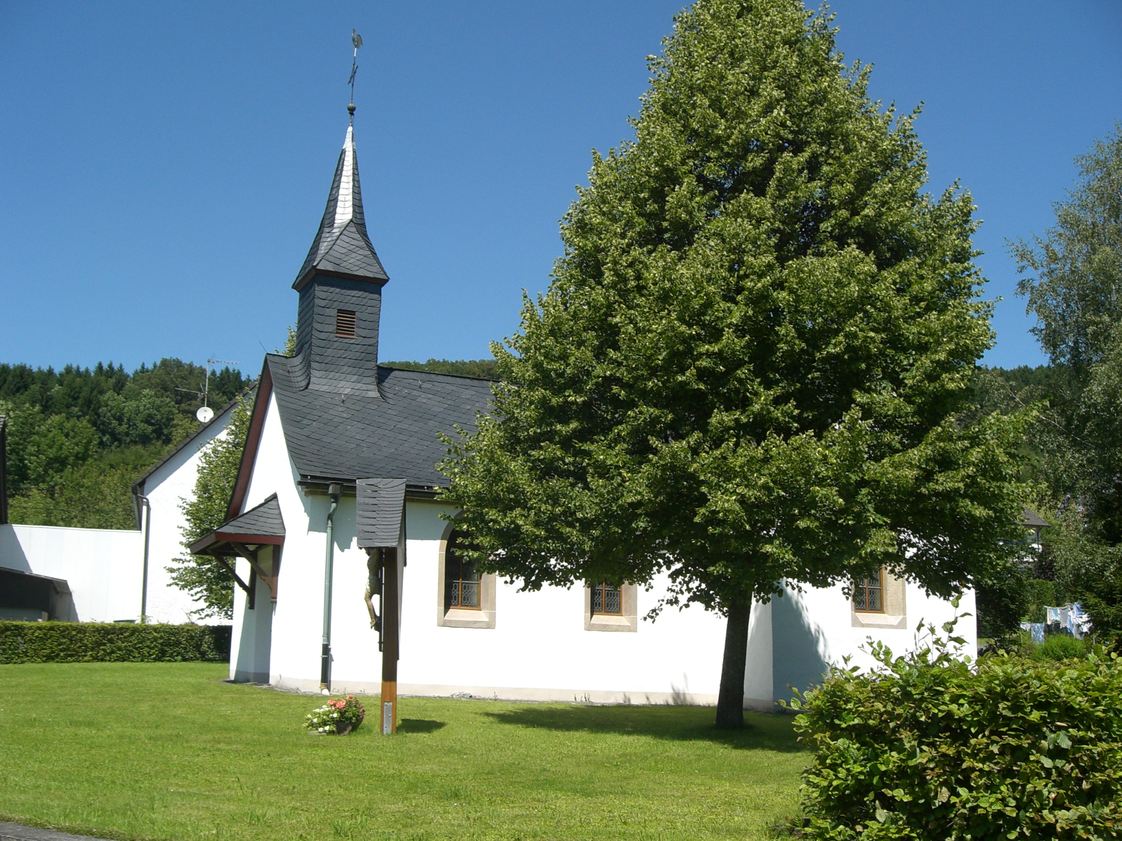 Das Bild zeigt die Kapelle St. Agatha in Obervalbert